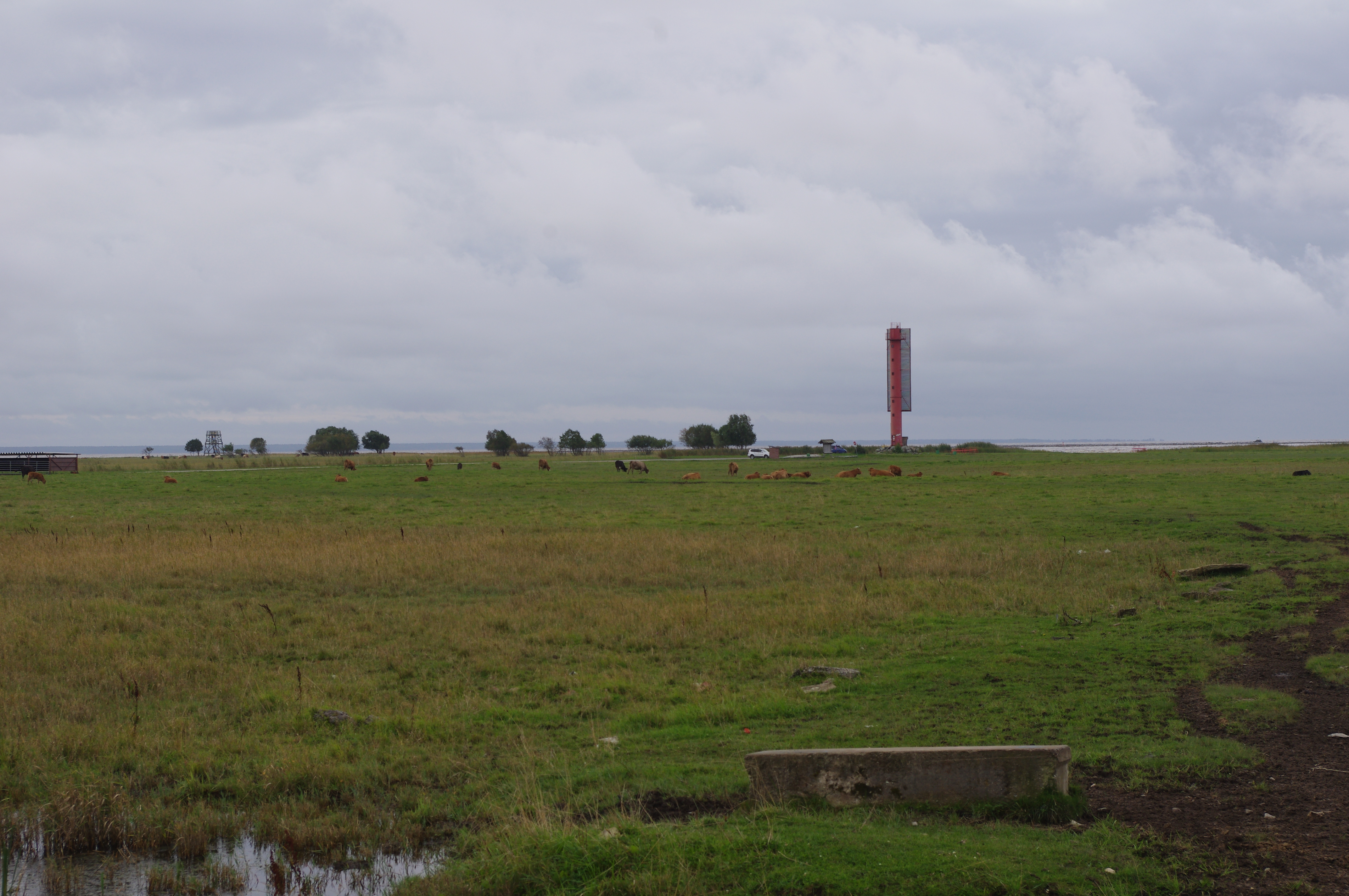 Vana-Pärnu rannaniit suvel 2016